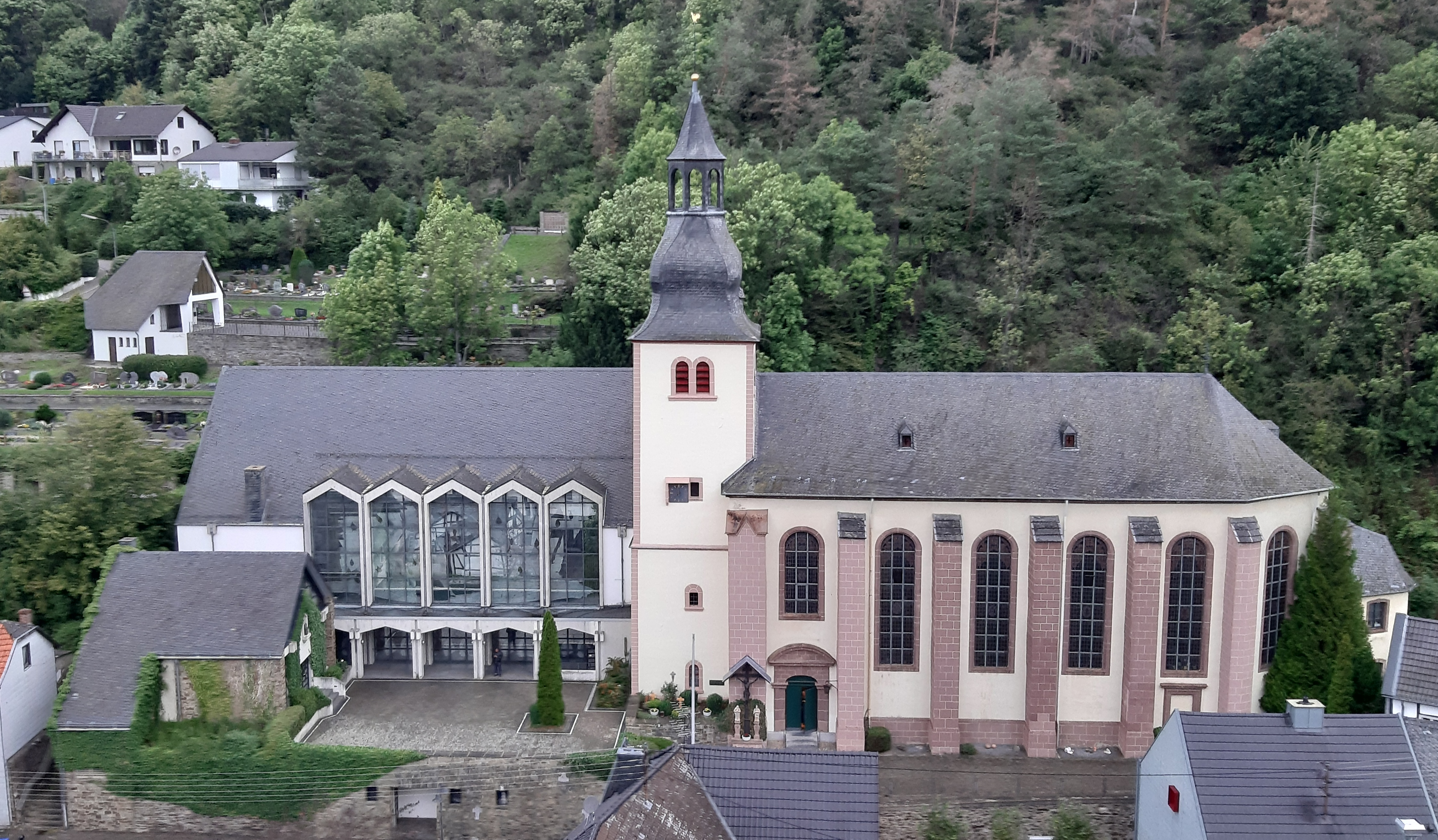 Pfarrkirche Heimbach (2019)